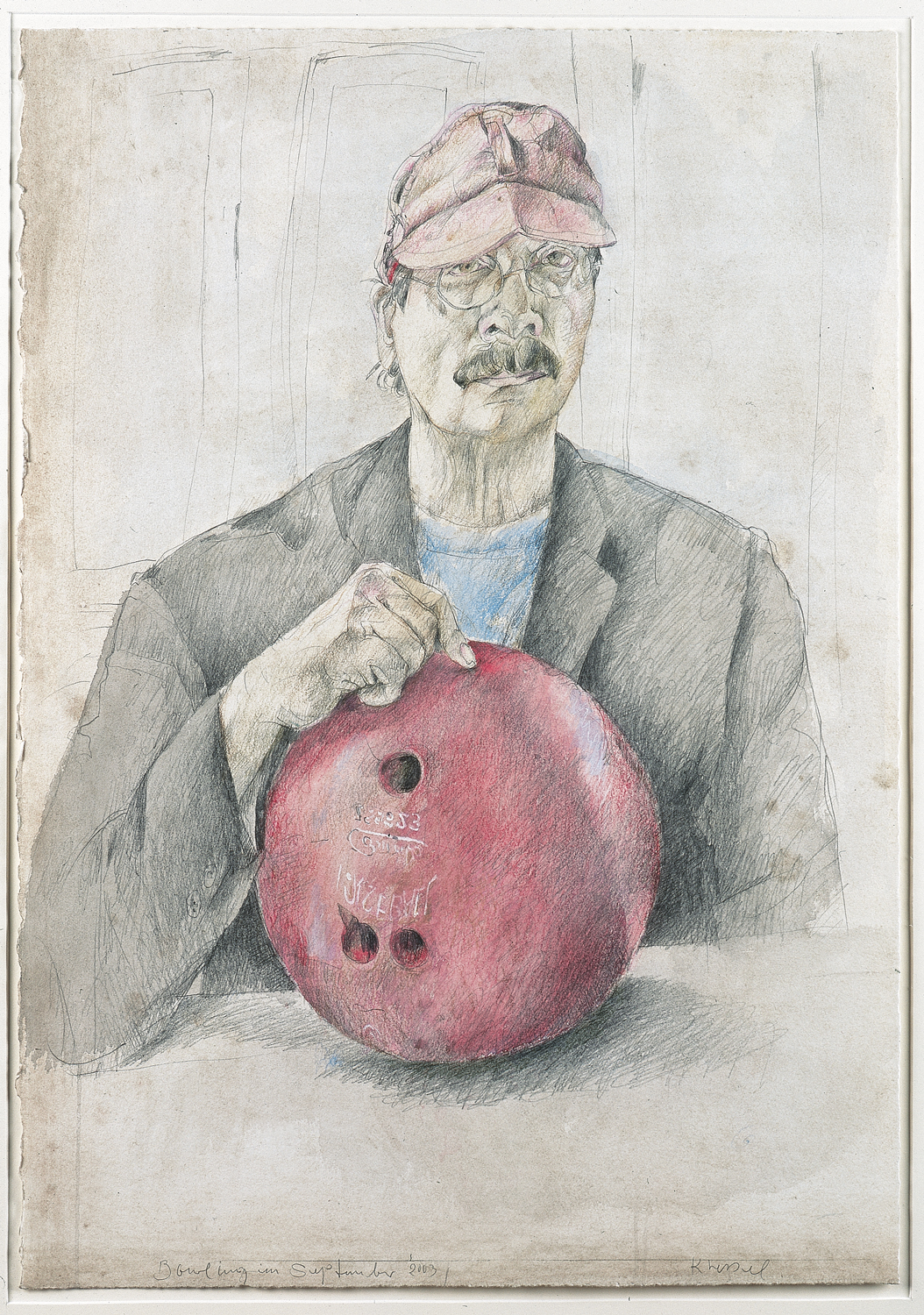 Diether Kressel, Zeichnung Selbstporträit -Bowling- 2003